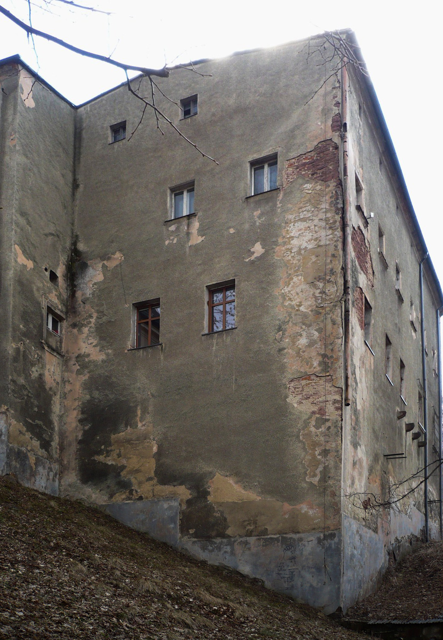 Nowa Ruda, ul. Piłsudskiego 2 - zamek Stillfriedów, obecnie biura, 1416, 1650, 1730 (zabytek nr A/935/1559 z 16.03.1966)